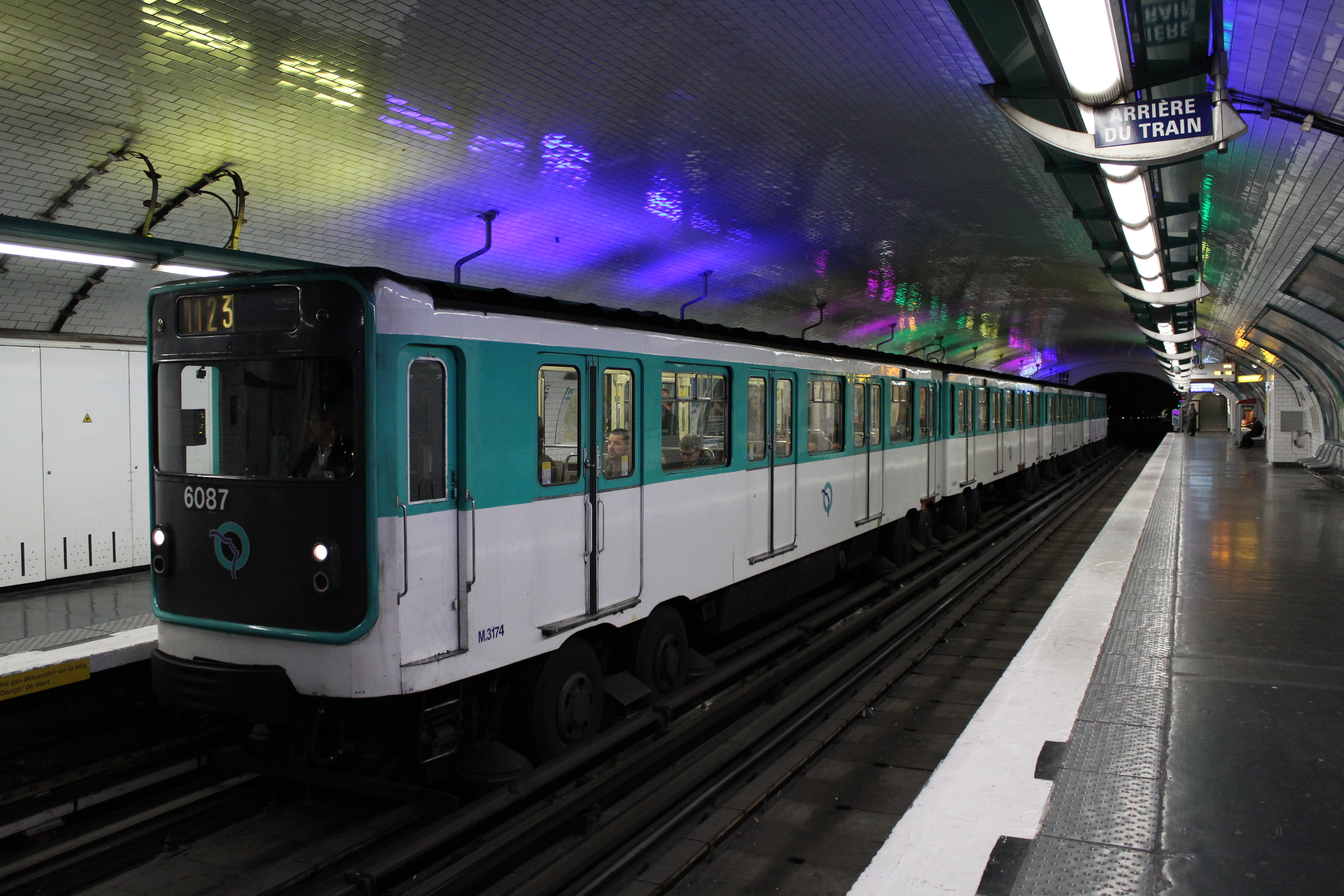 Rame MP59 n°6087 à Rambuteau sur la ligne 11.